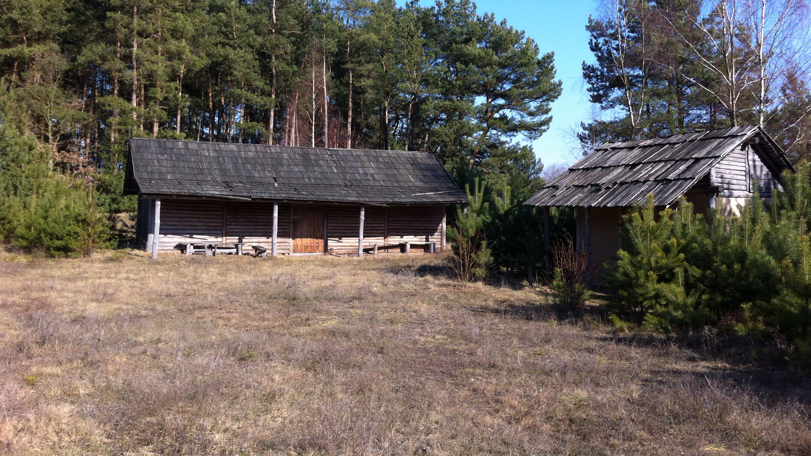 Tarczyny Grodzisko Średniowieczne